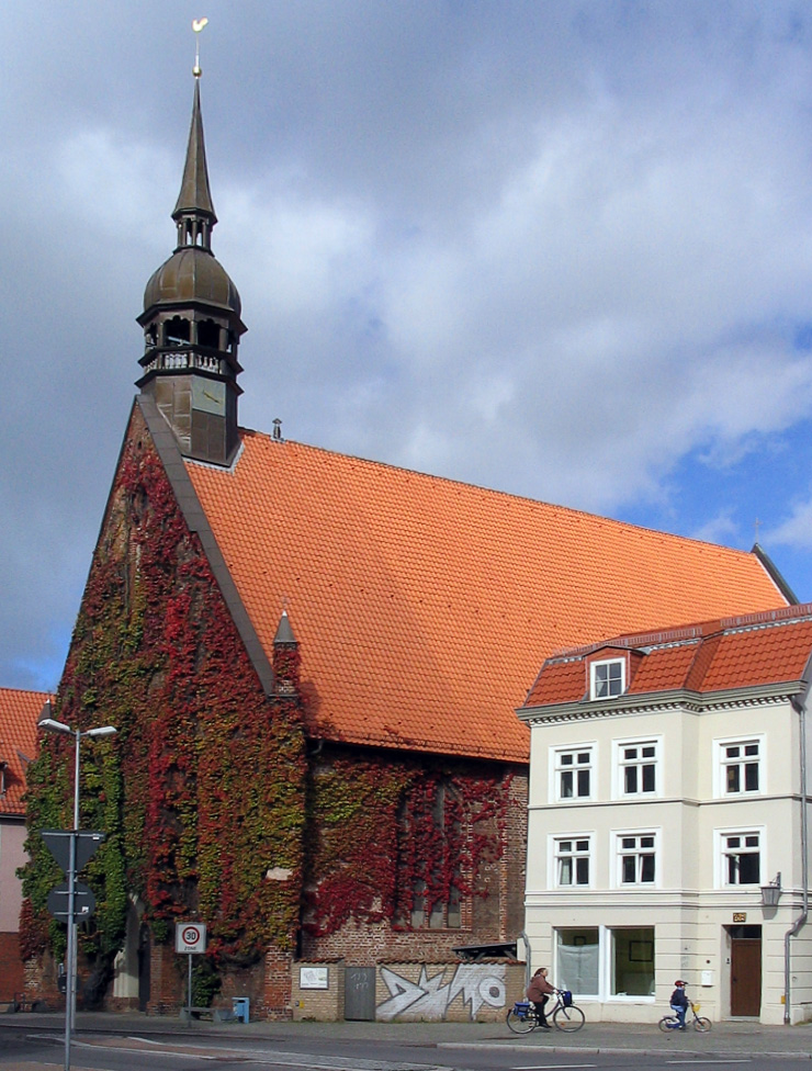 Beschreibung: Heilgeistkirche - Heilgeistchurch Fotograf: Darkone, 24. September 2004